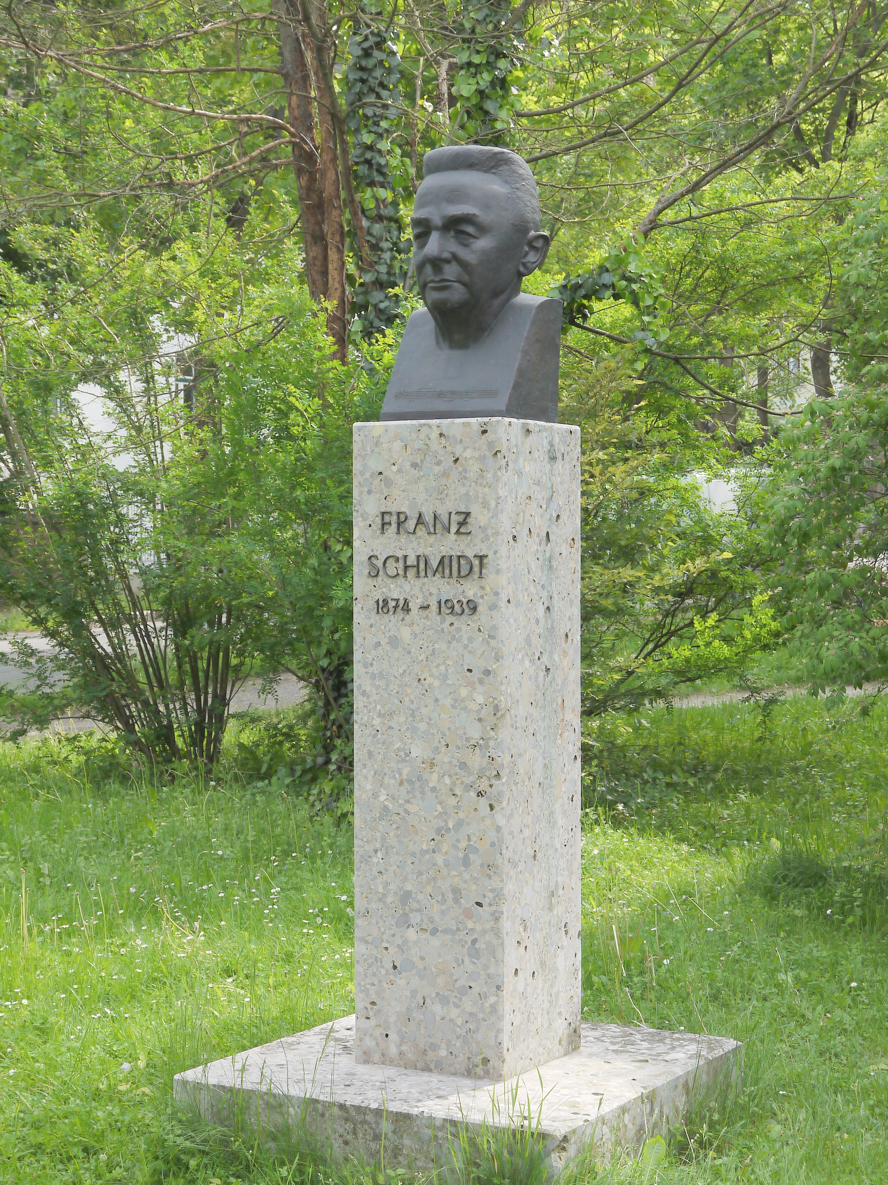 Franz Schmidt-DenkmalWien-Ober Sankt Veit, Ghelengasse.Die Büste schuf Hilde Uray 1954, (siehe das Bild mit ihrer Signatur); der Bronzeguss stammt aus der Kunstgießerei Alfred Zöttl, Wien.Die Enthüllung fand am 16. Juni 2005 statt.